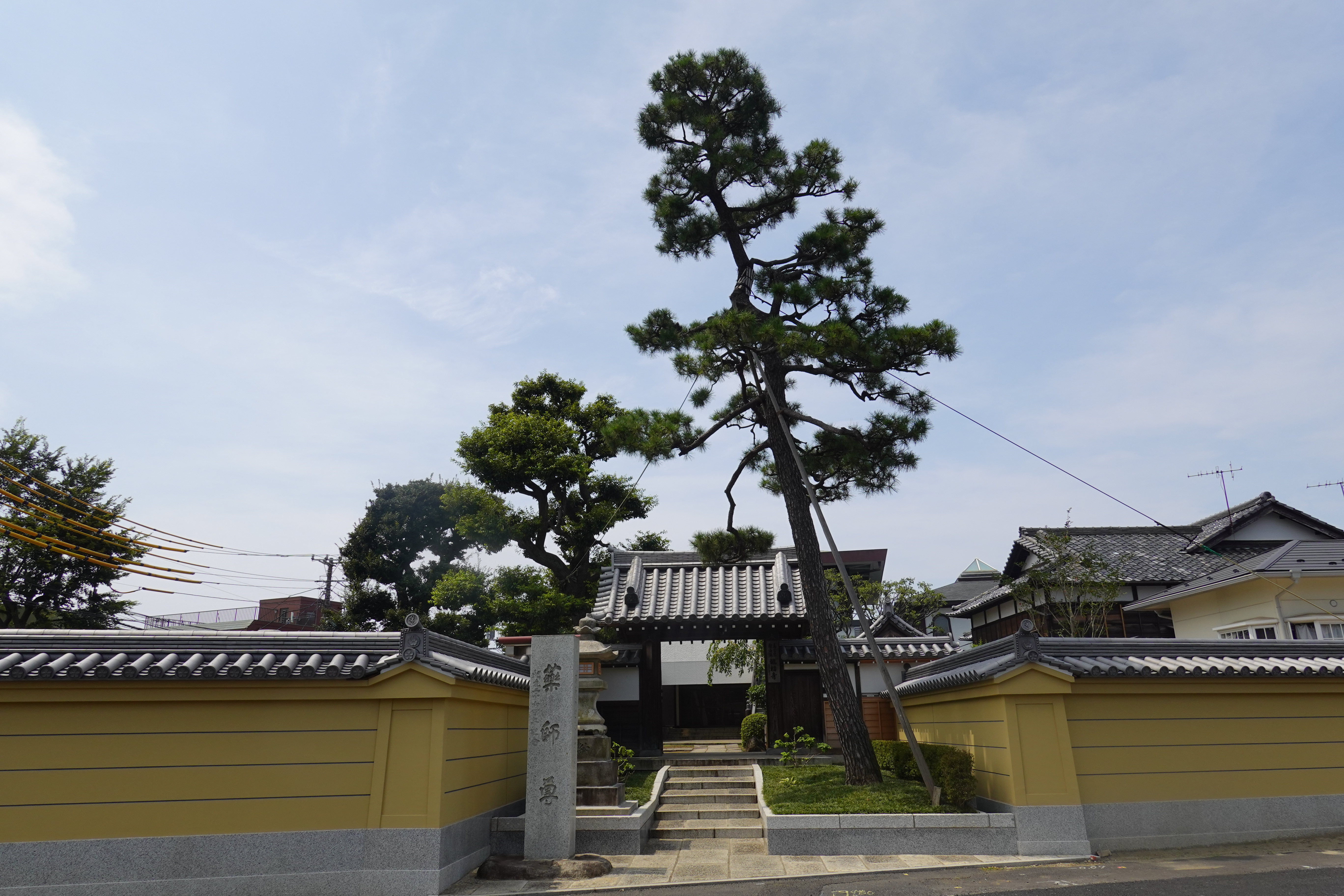 山門前の松の古木